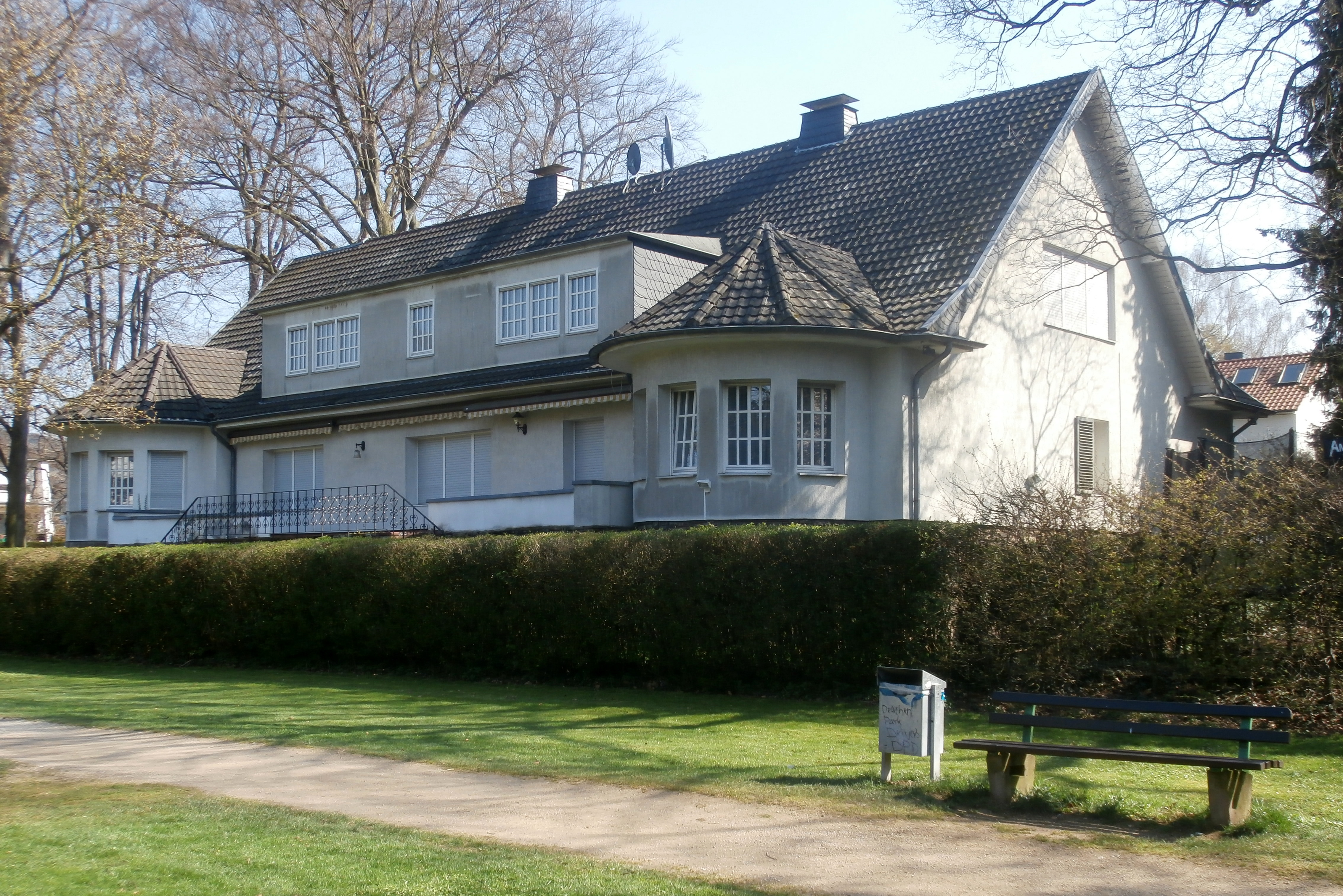 Ehemalige Residenz der Botschaft von Algerien, Viktor-Schnitzler-Straße 13, Mehlem, Bad Godesberg: Ansicht vom Drachensteinpark